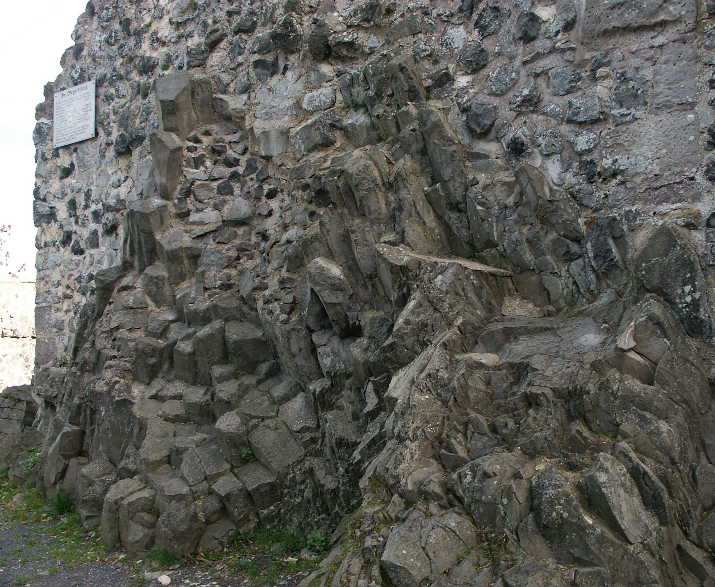 Basaltbasis des Stoppelsberges am Bergfried der Burg Hauneck